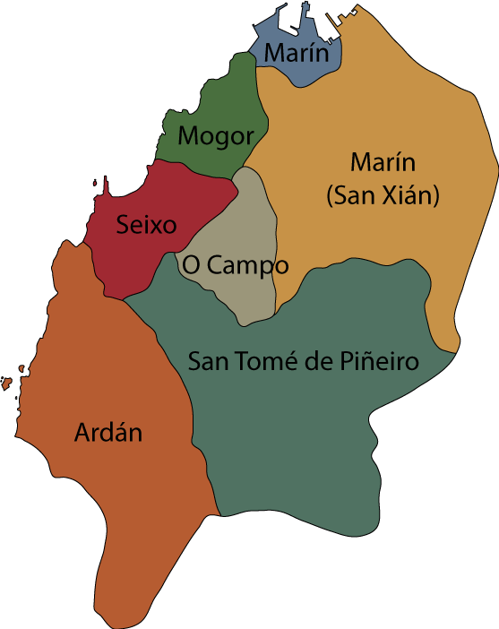 Parroquias do concello de Marín (Galiza).